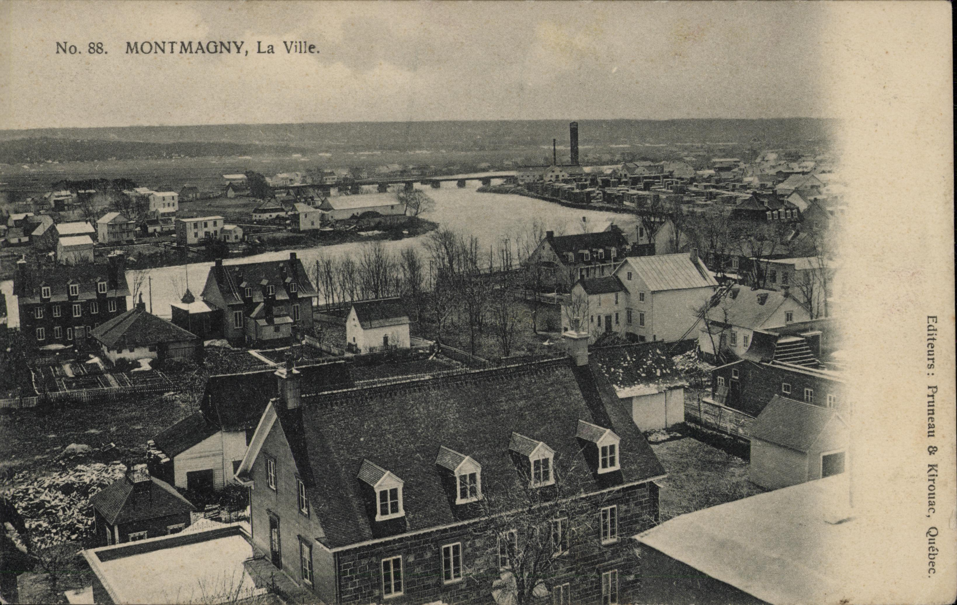 Montmagny, la ville, carte postale, Pruneau & Kirouac